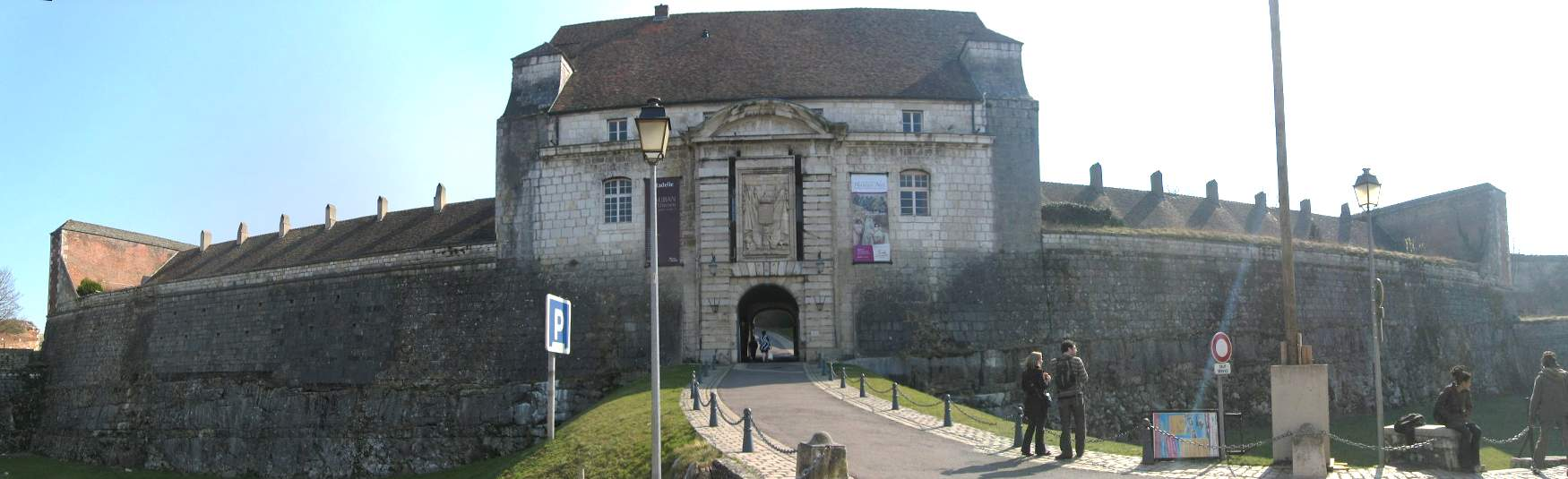 Panoramique de l'entrée de la Citadelle de Besançon - Franche-Comté - France